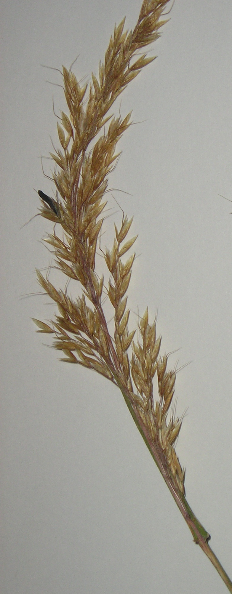 Trisetum flavescens avec Claviceps purpurea